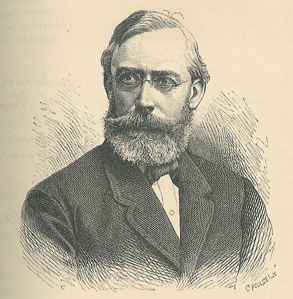 Christian Knud Frederik Molbech.